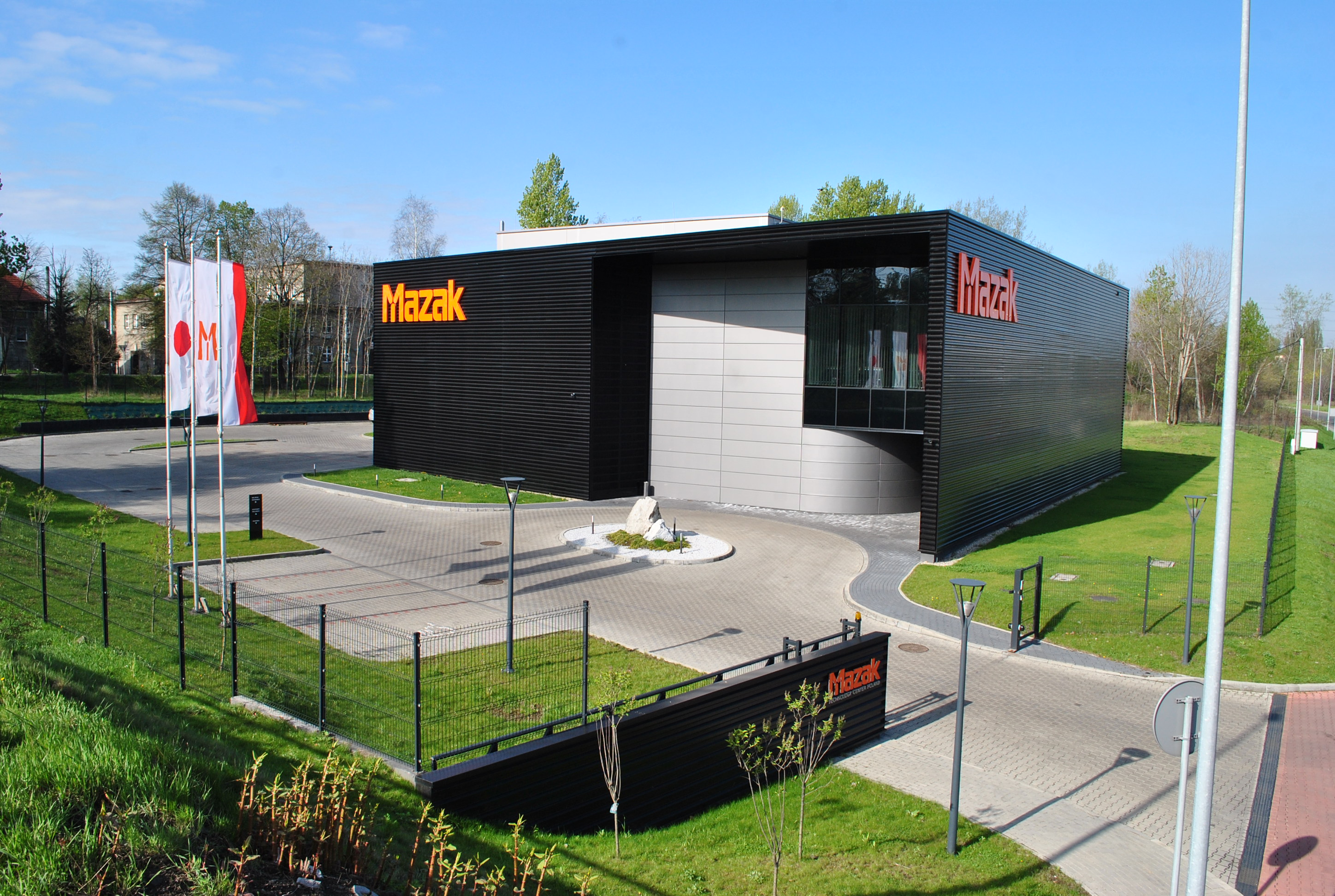 Katowice-Obroki. Centrum Technologiczne Yamazaki Mazak, Trasa Nikodema i Józefa Renców 33